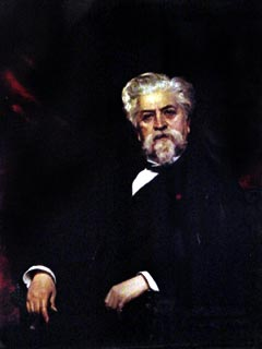 Каролюс-Дюран. Портрет Жоржа Шарля де Геккерна Дантеса. Около 1878